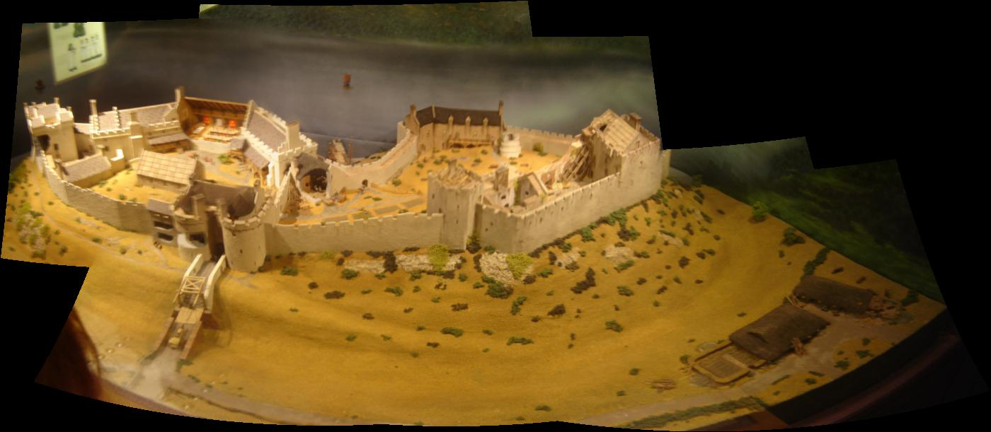 Modell des Urquhart Castle. Das Model selbst steht in der Ausstellung zum Castle